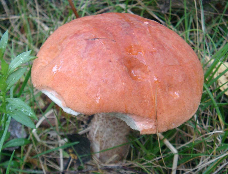 Leccinum vulpinum